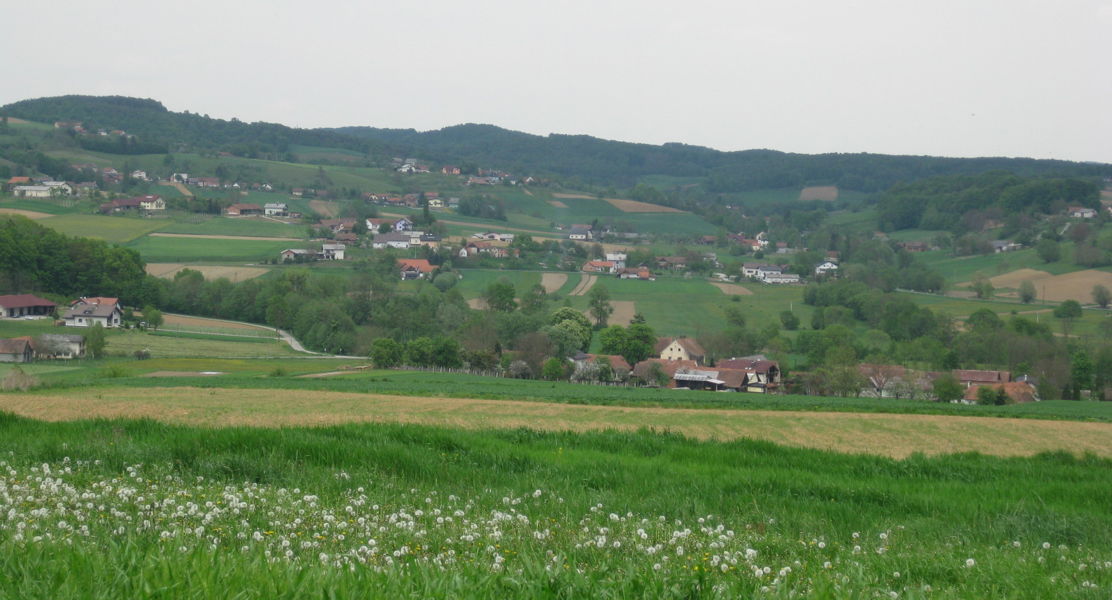 Serdica, village in Slovenia